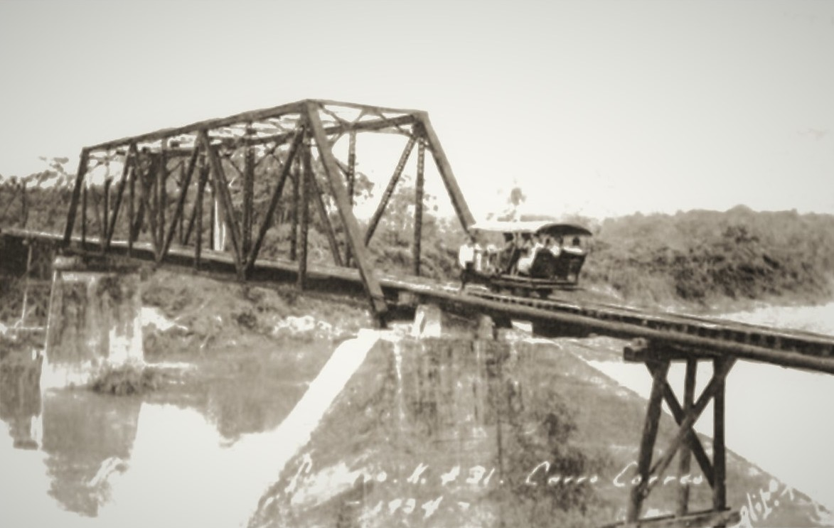 Puento sobre el Rio Cazones - Ferrocarril de via angosta a Campo Furbero - Ano de 1934 gut